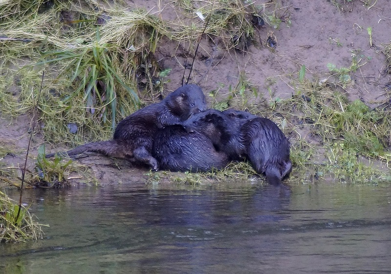 Wydra (Lutra lutra) z podrośniętymi młodymi.